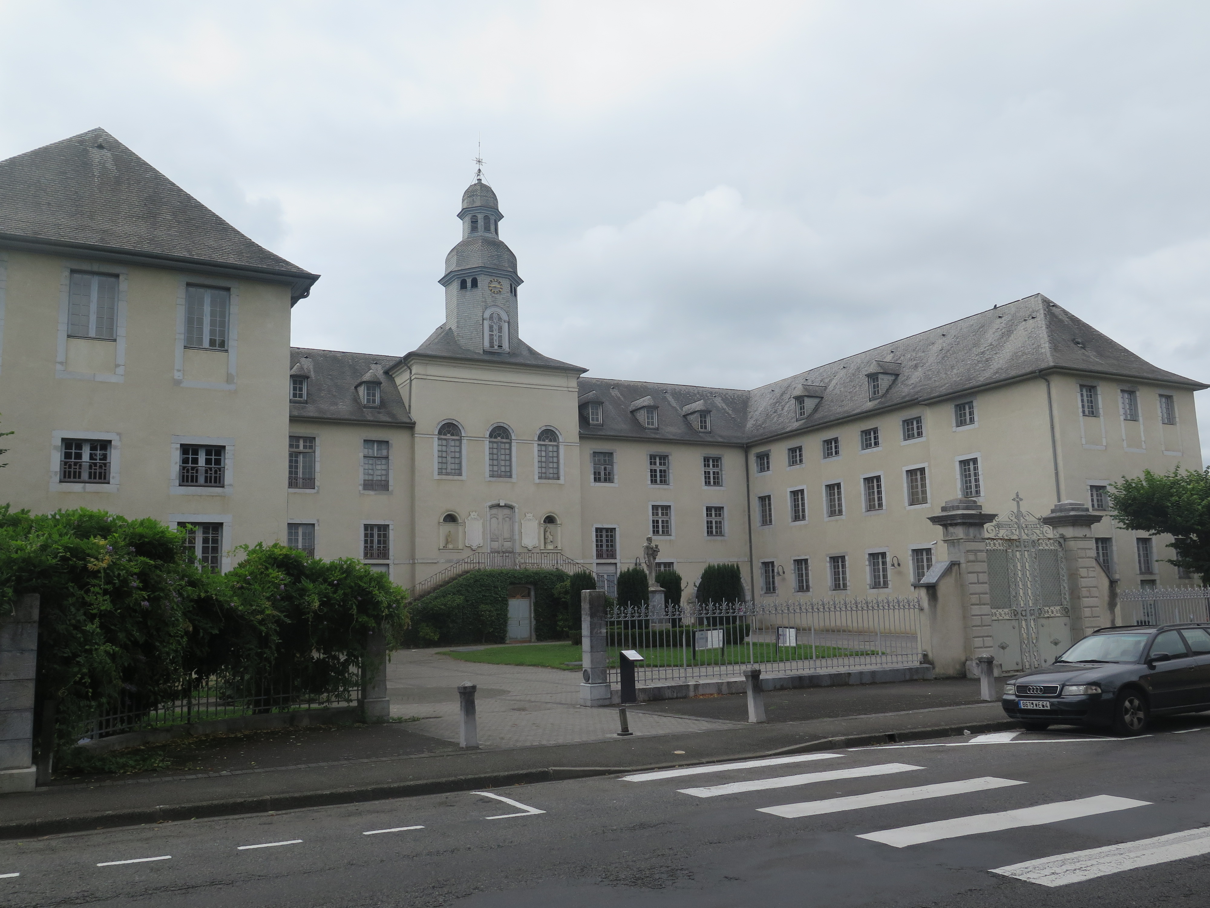 Hôpital de Tarbes .